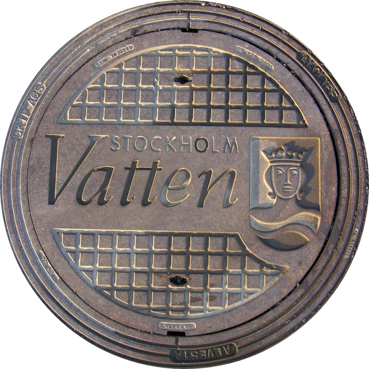 Gullideckel "Stockholm Vatten"